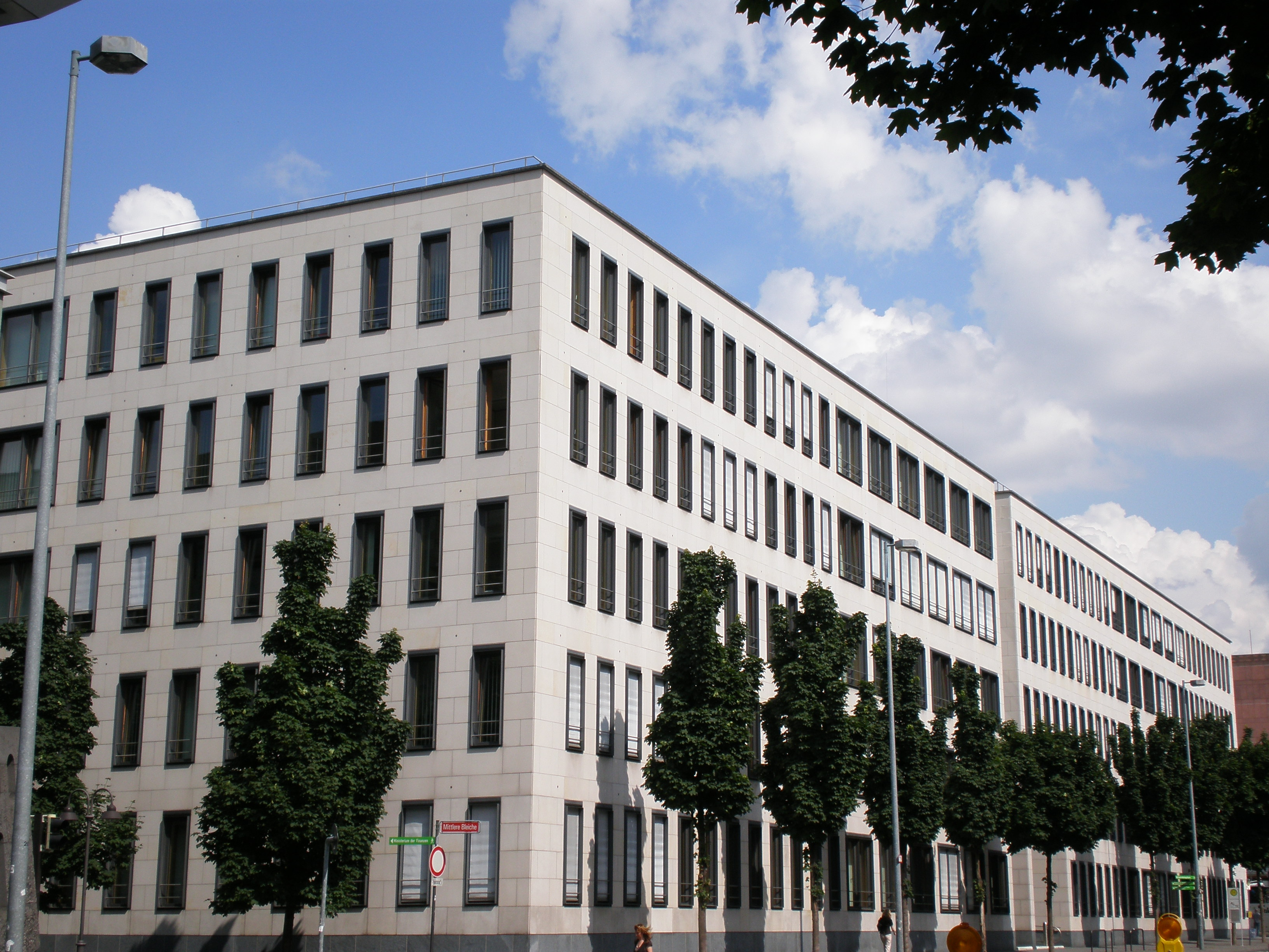 Abgeordnetenhaus des rheinland-pfälzischen Landtages in Mainz